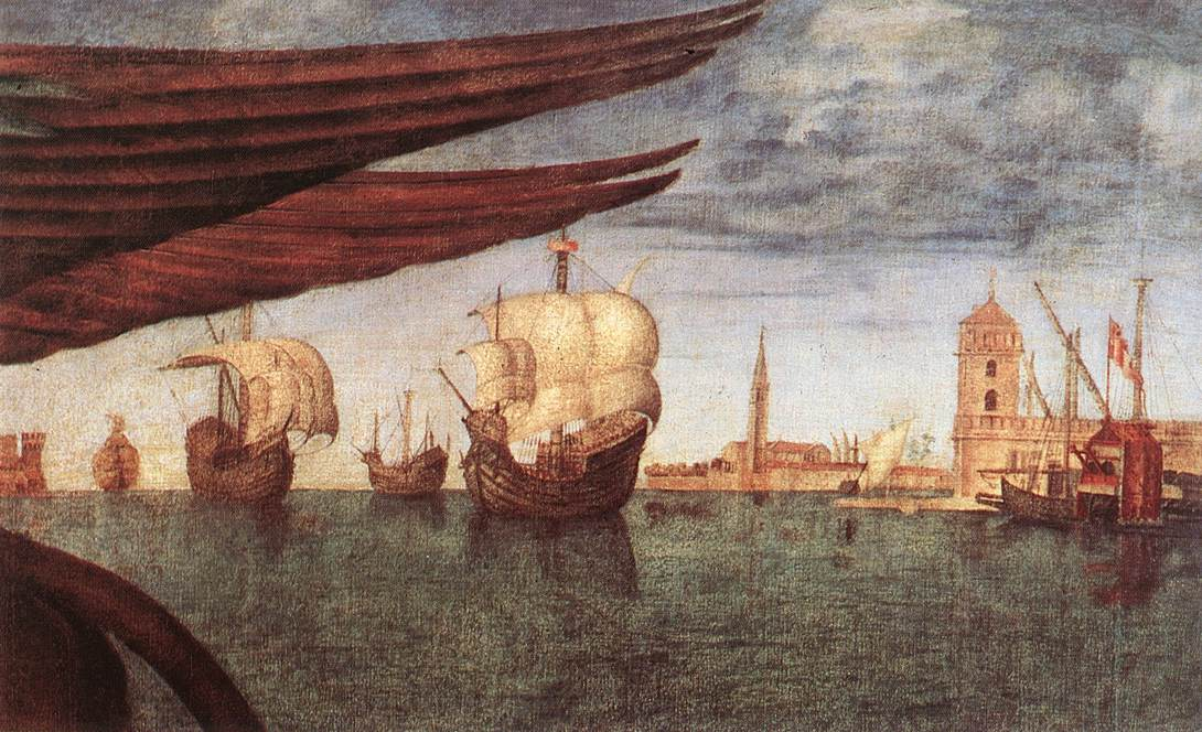 detail